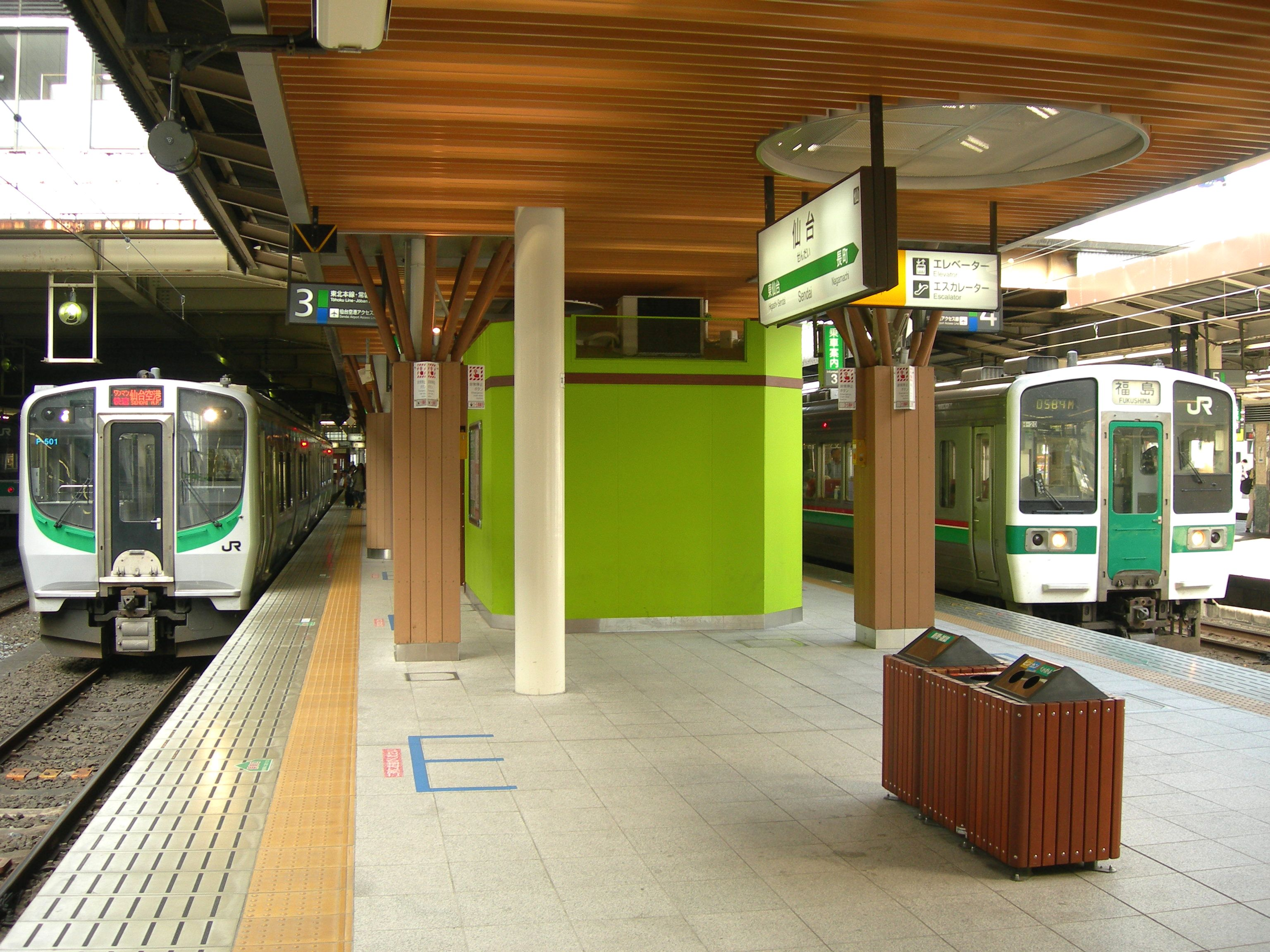 JR東日本 仙台駅 3・4番線ホーム